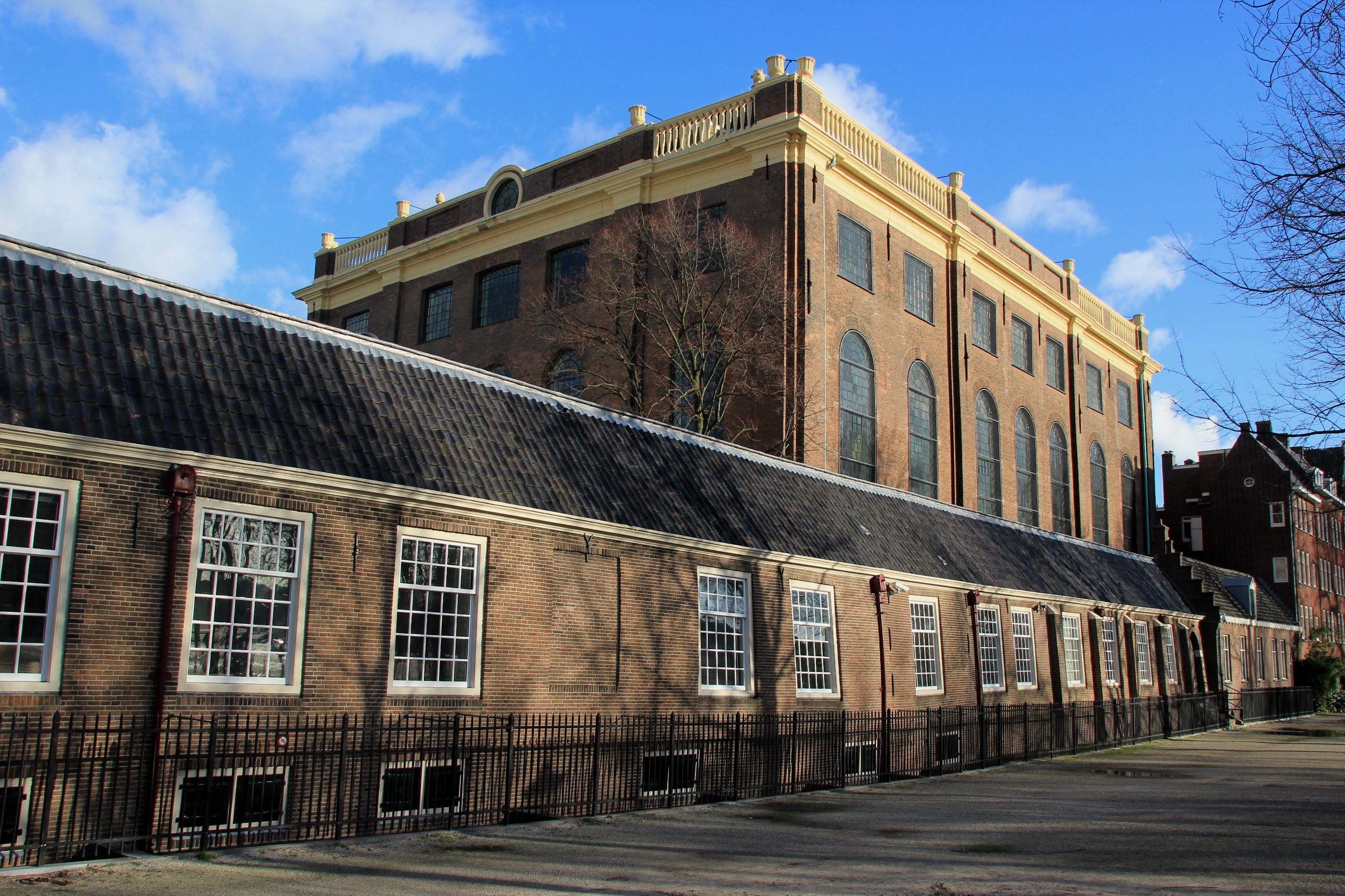 Amsterdam, Portugese Synagoge